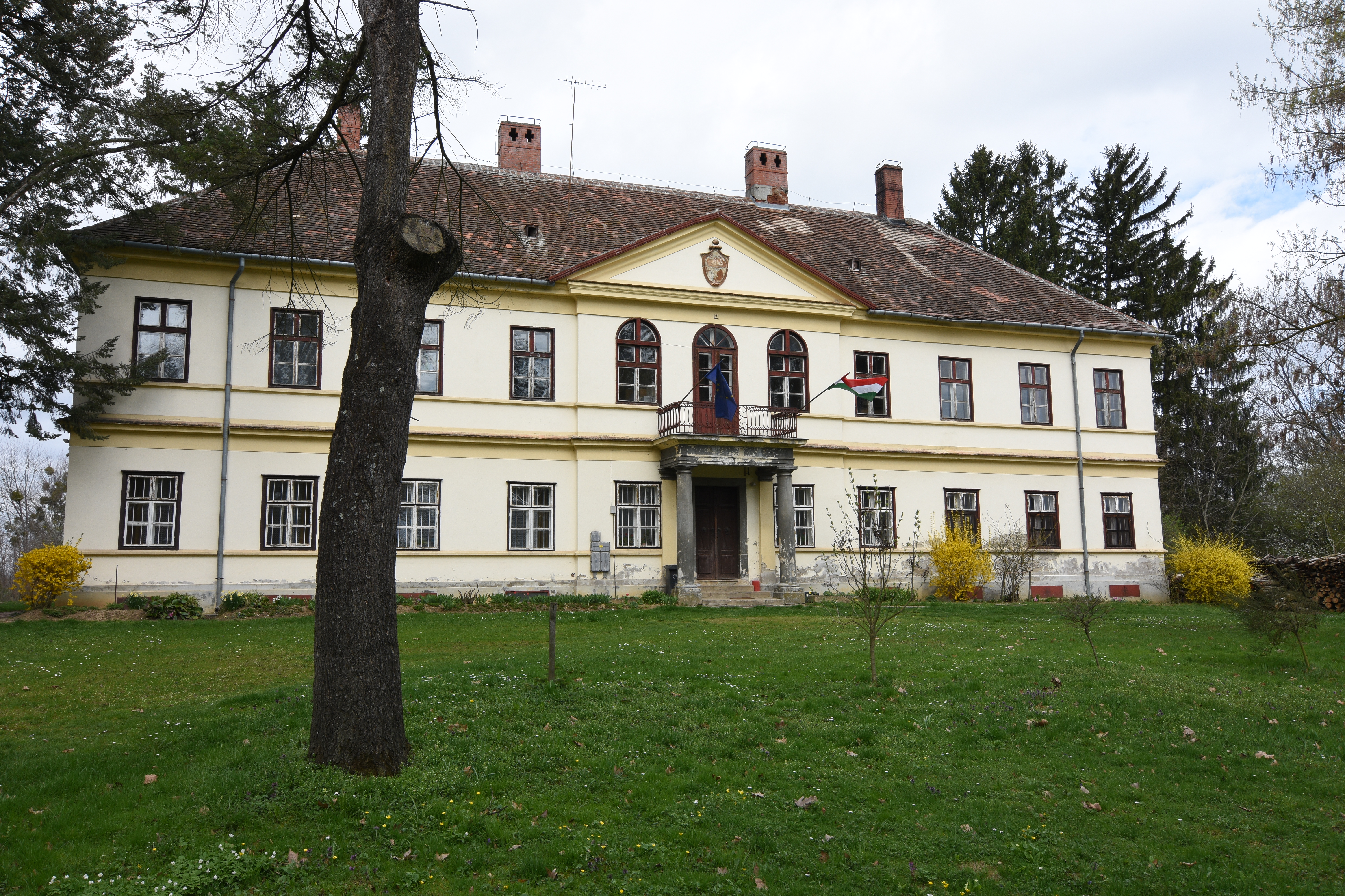 Sibrik Mansion in Szarvaskend